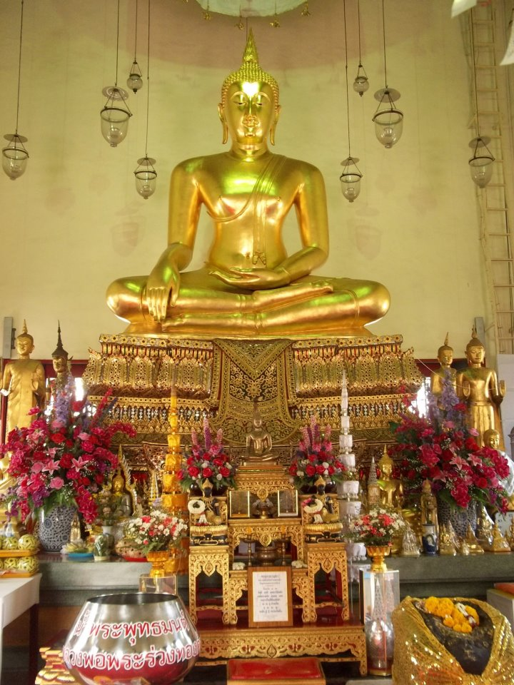 หลวงพ่อพระร่วง พระพุทธรูปทองคำ ประดิษฐานที่วัดมหรรณพาราม